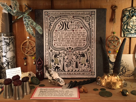 Einige der vielen Ausstellungsstücke